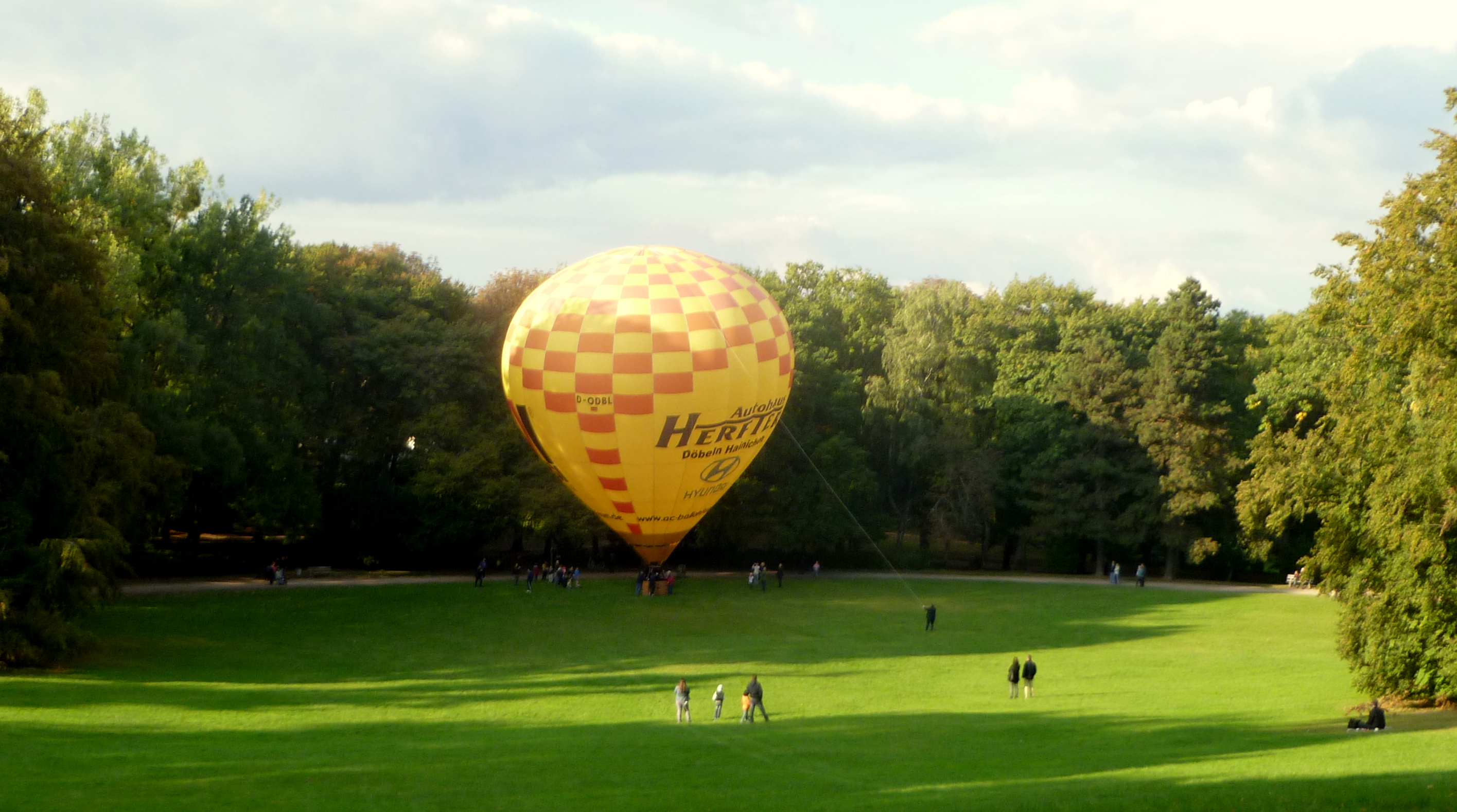 Heißluftballon im Stadtgarten Aachen